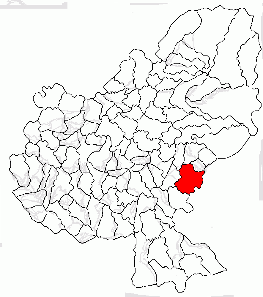 Categorie:Hărţi ale judeţului Mureş